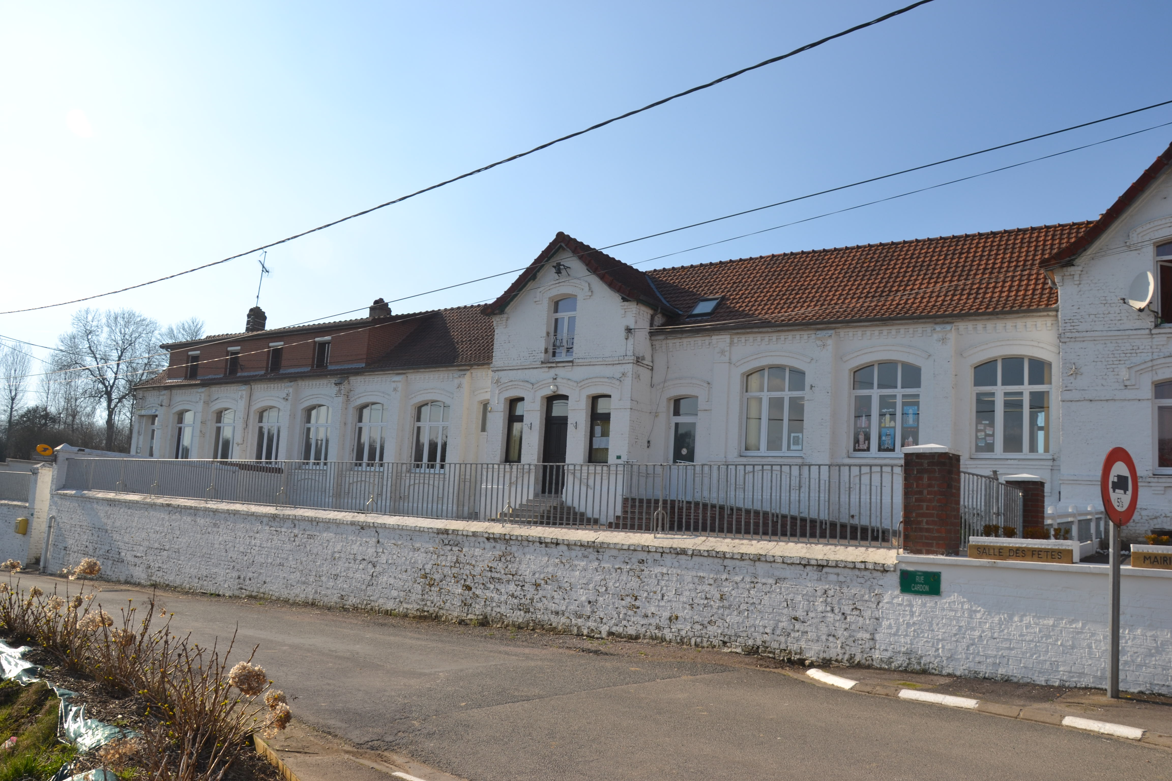 La mairie-école d'Embry avec son bureau de poste (à gauche) et sa salle des fêtes (à droite)